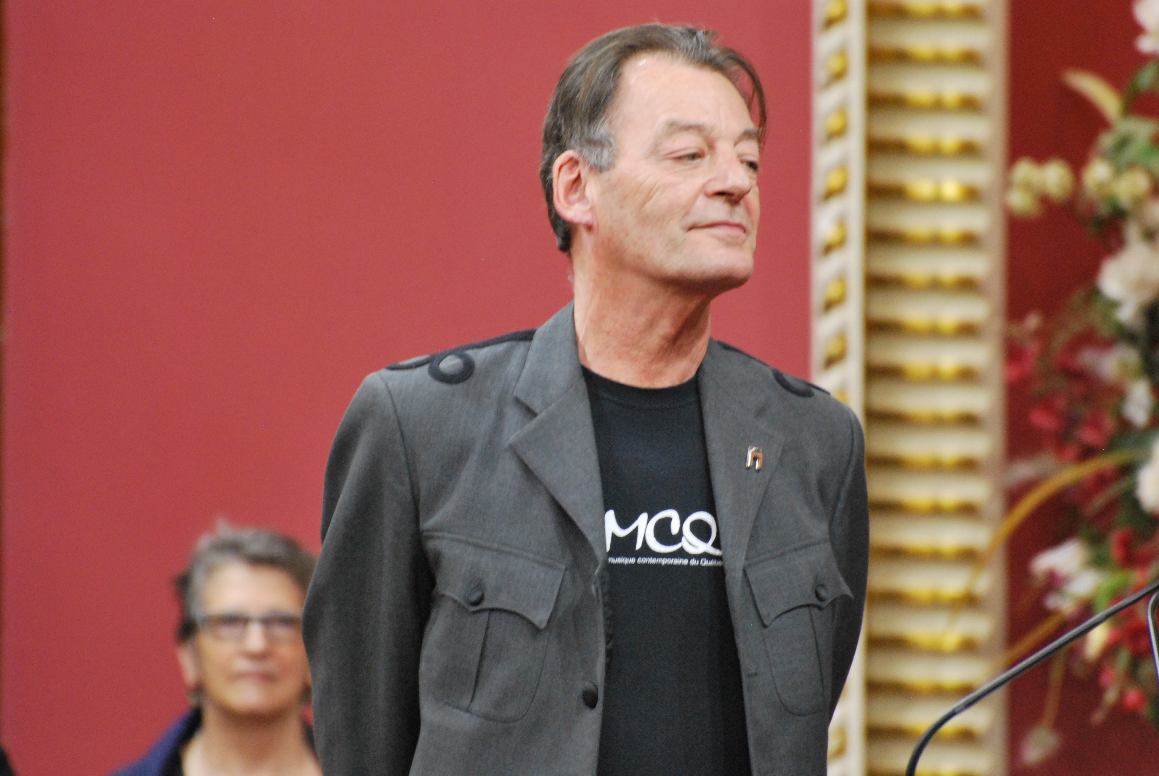 Cérémonie de remise de l'ordre national du Québec 2013.